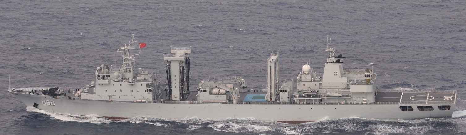 中文（台灣）: 903型綜合補給艦 舷號890巢湖艦